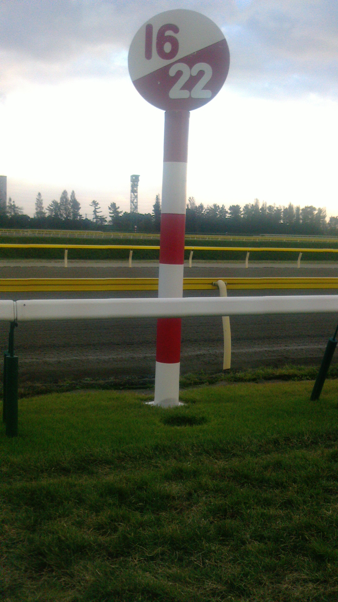 新潟競馬場の内回り1600m、外回り2200m地点のハロン棒。2013年3回開催最終日の芝コース開放時に撮影